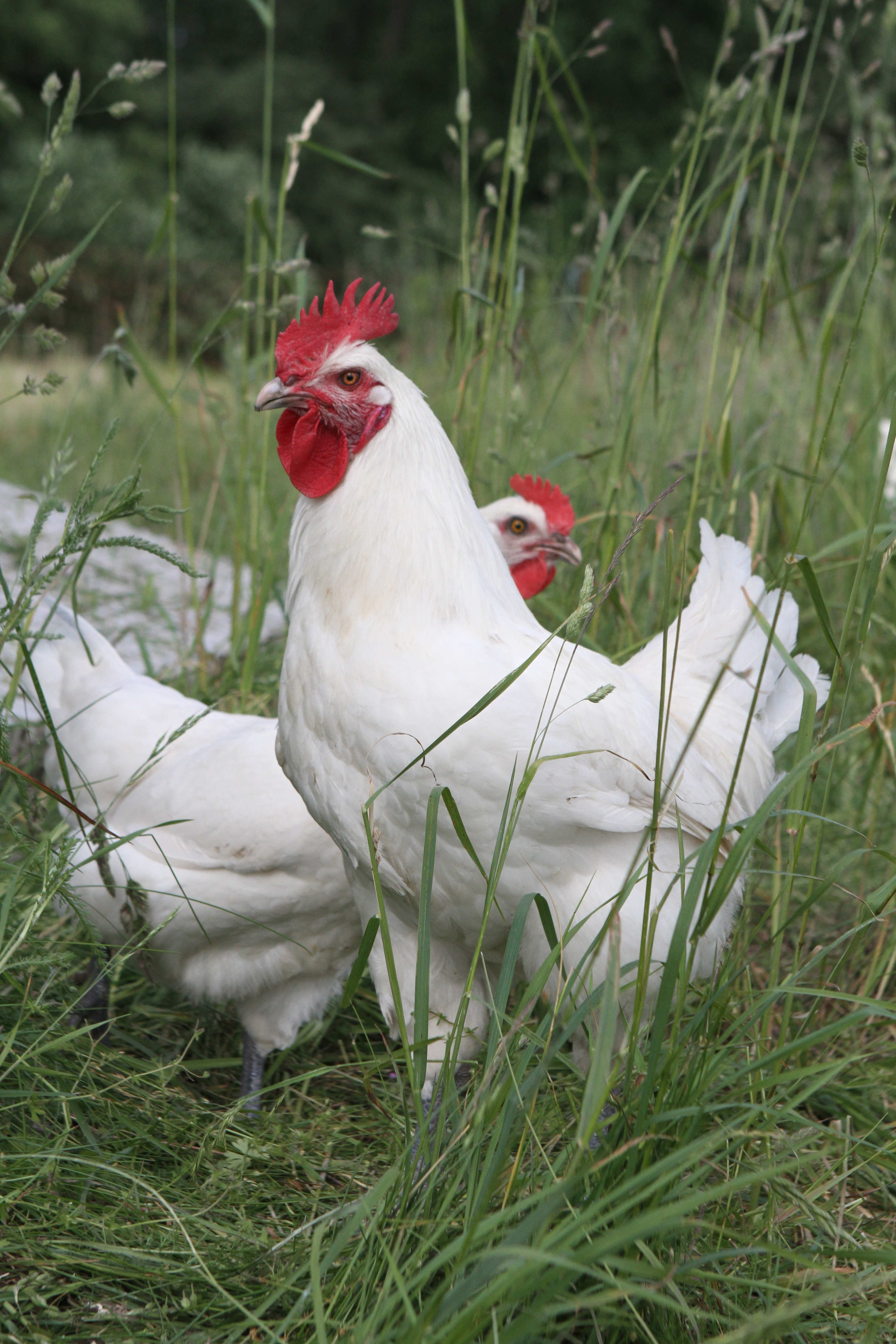 Les-Bleus-Huhn auf der Wiese